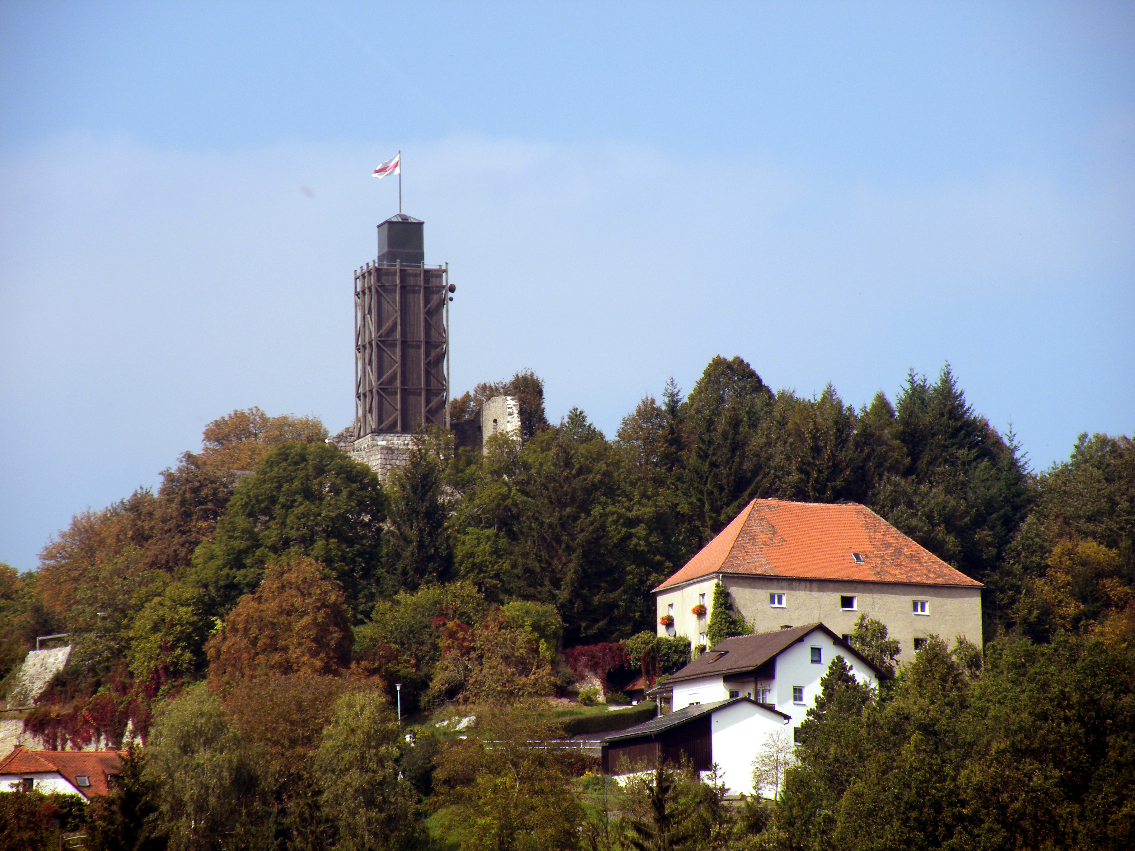 Aussichtsturm auf der Burgruine Brennberg, im Vordergrund der alte Getreidespeicher welcher heute als Wohnhaus dient.